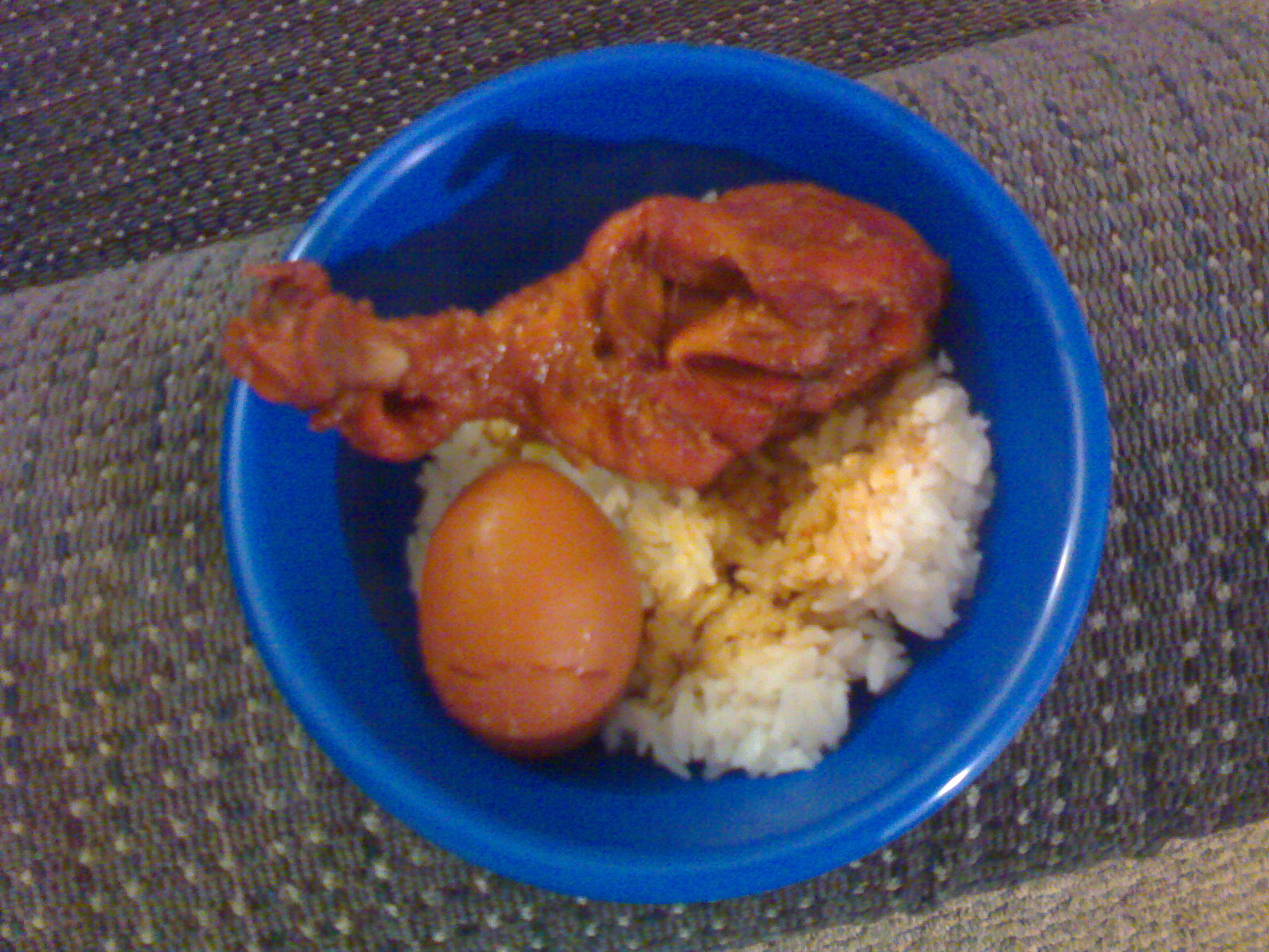 滷蛋